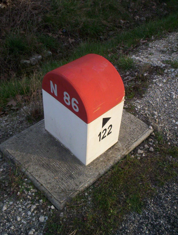 Borne de l'ancienne Nationale 86 (aujourd'hui la D86)